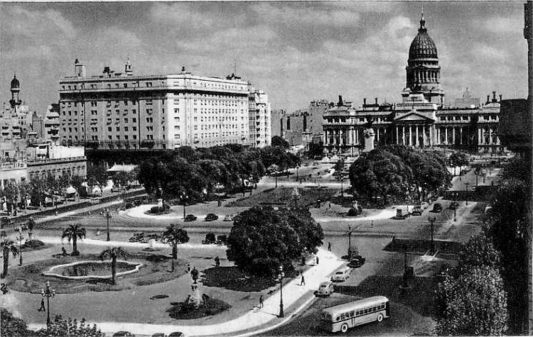 Vista de la Plaza Congreso, el Congreso Nacional de la Argentina y el edificio de la Caja de Ahorro Postal (hoy Biblioteca del Senado).